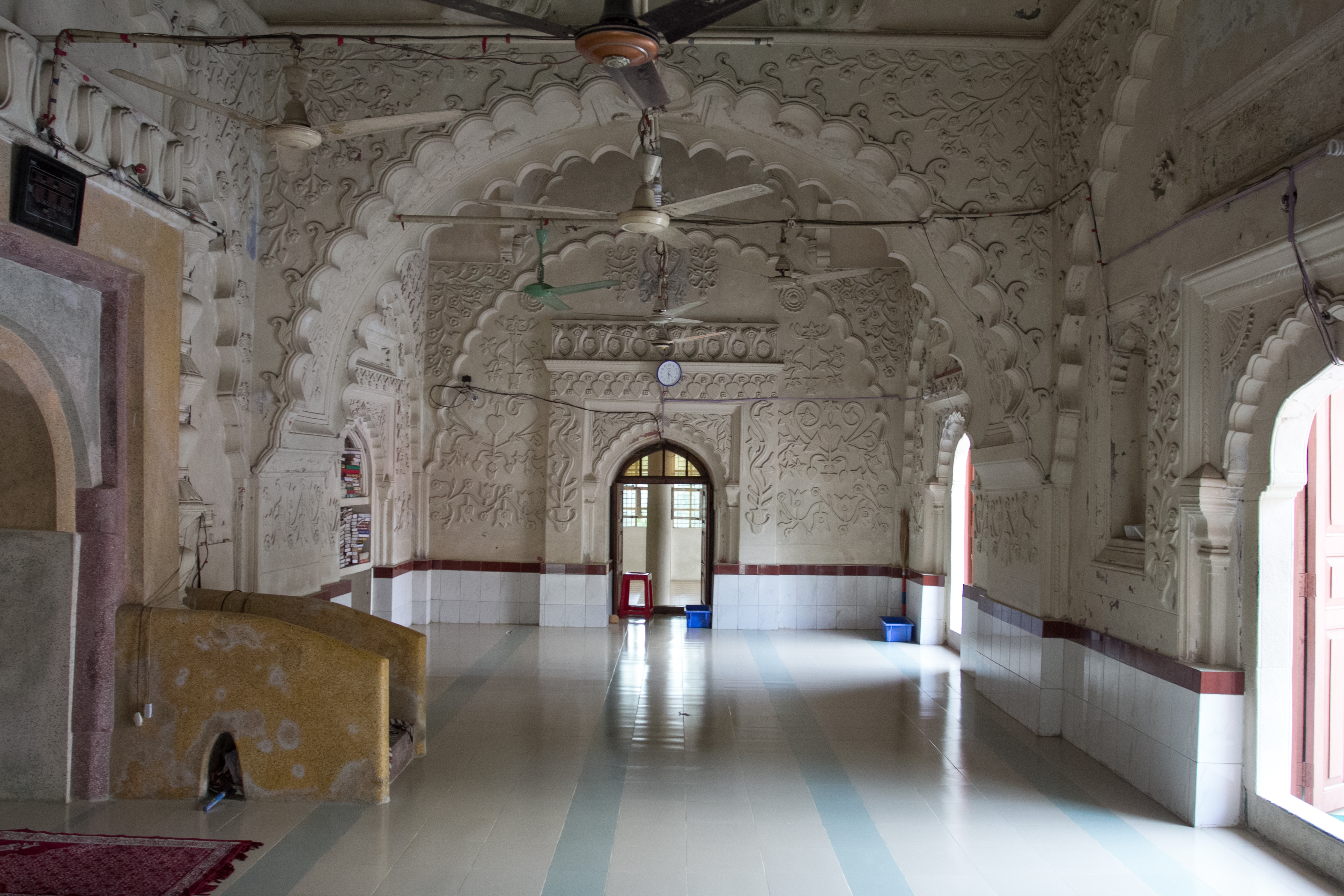 বজরা শাহী মসজিদ